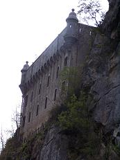 fort du portalet , boyacoco